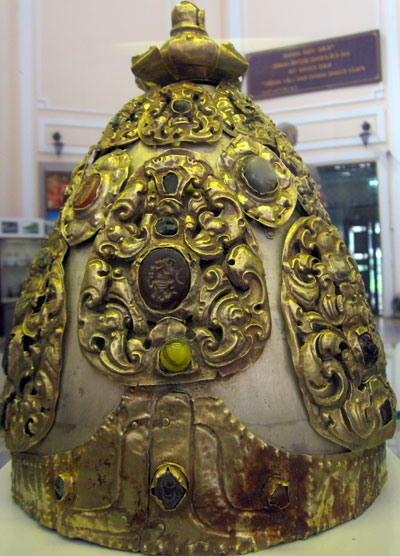 Mão vàng của Po Klong M'hnai, được chế tác trong khoảng thế kỷ XVII-XVIII, hiện đang trưng bày tại Bảo tàng Lịch sử Việt Nam thuộc Thành phố Hồ Chí Minh.